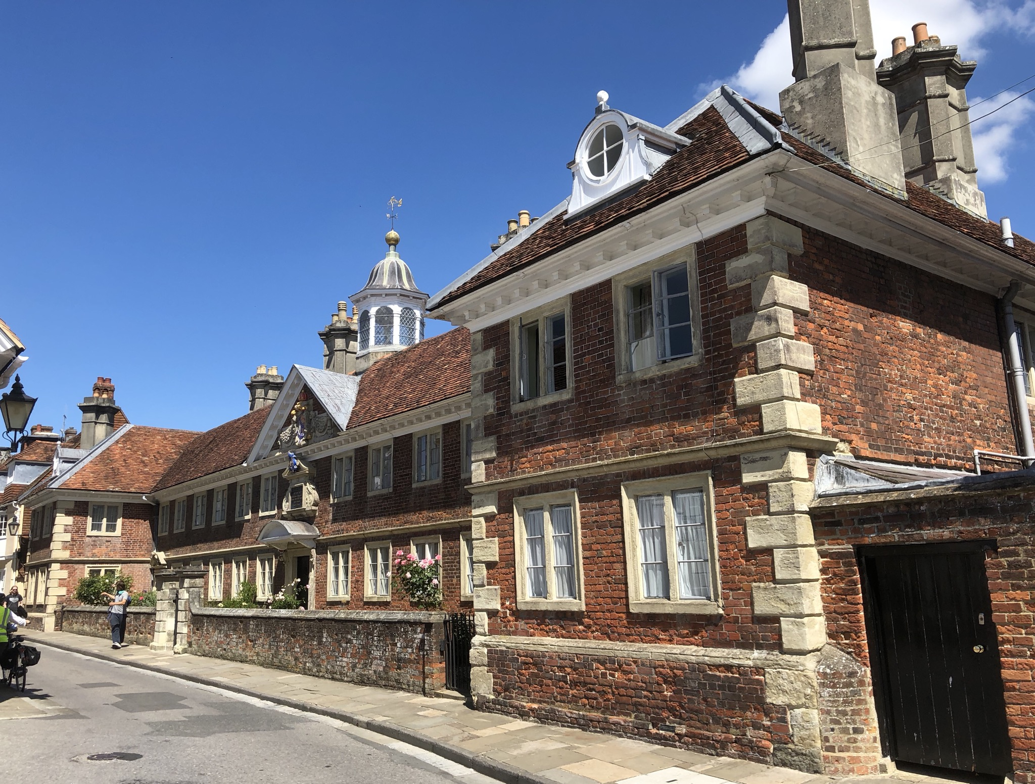 Forecourt Walls 2019 in Salisbury